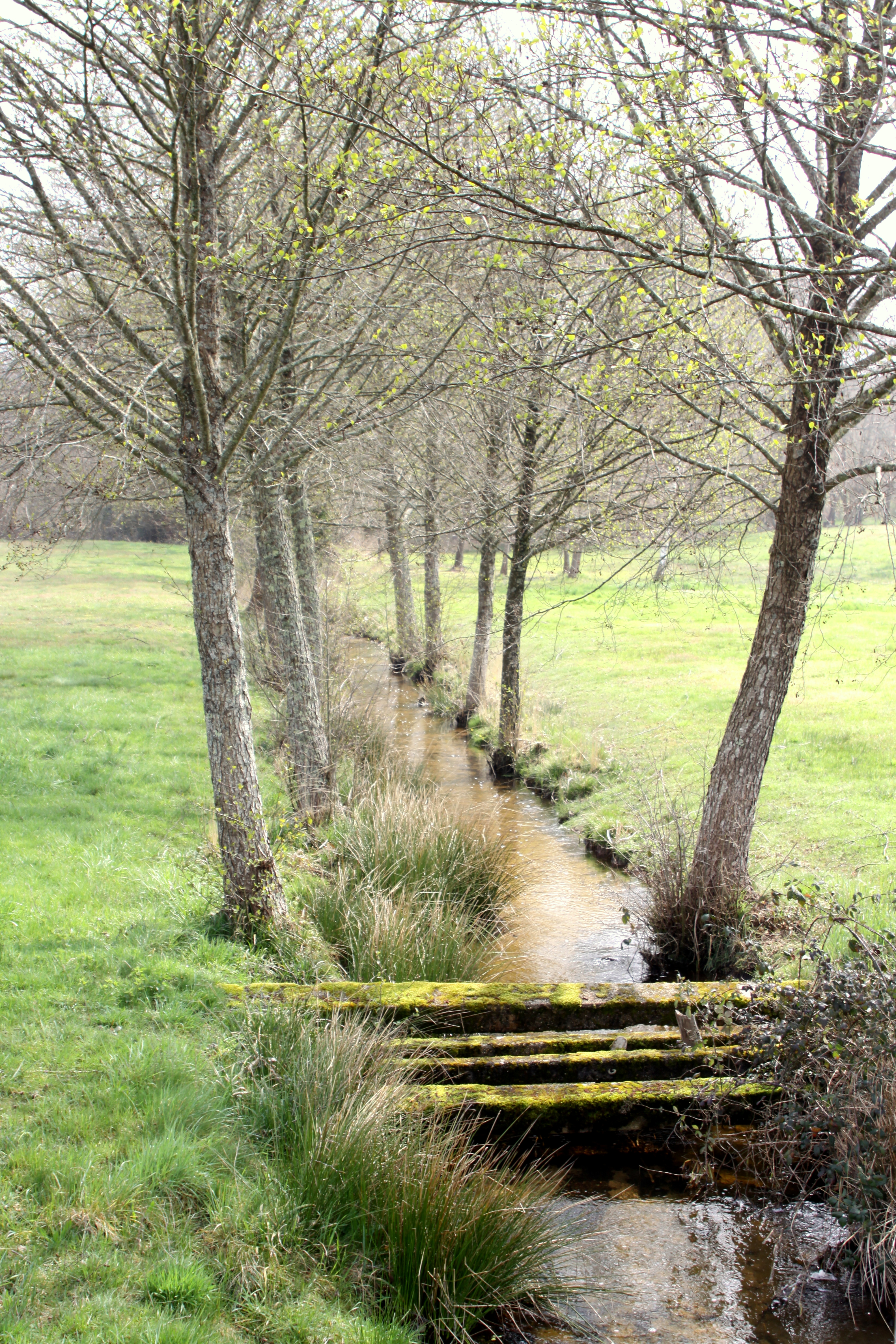 Den Estrigon um Sen